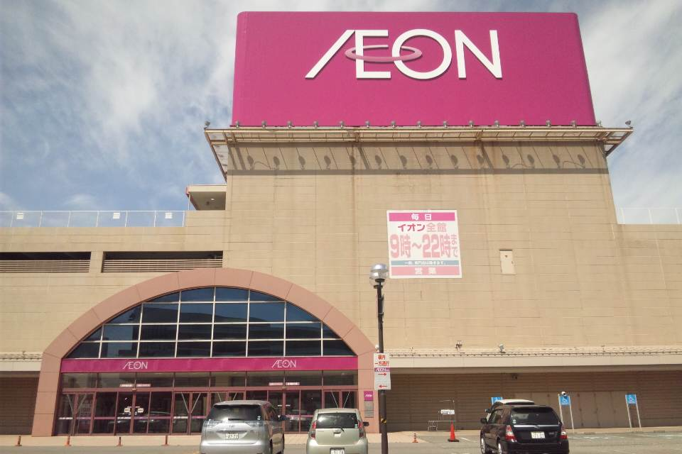 イオン御経塚店